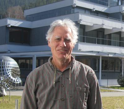 Foto di James Robins